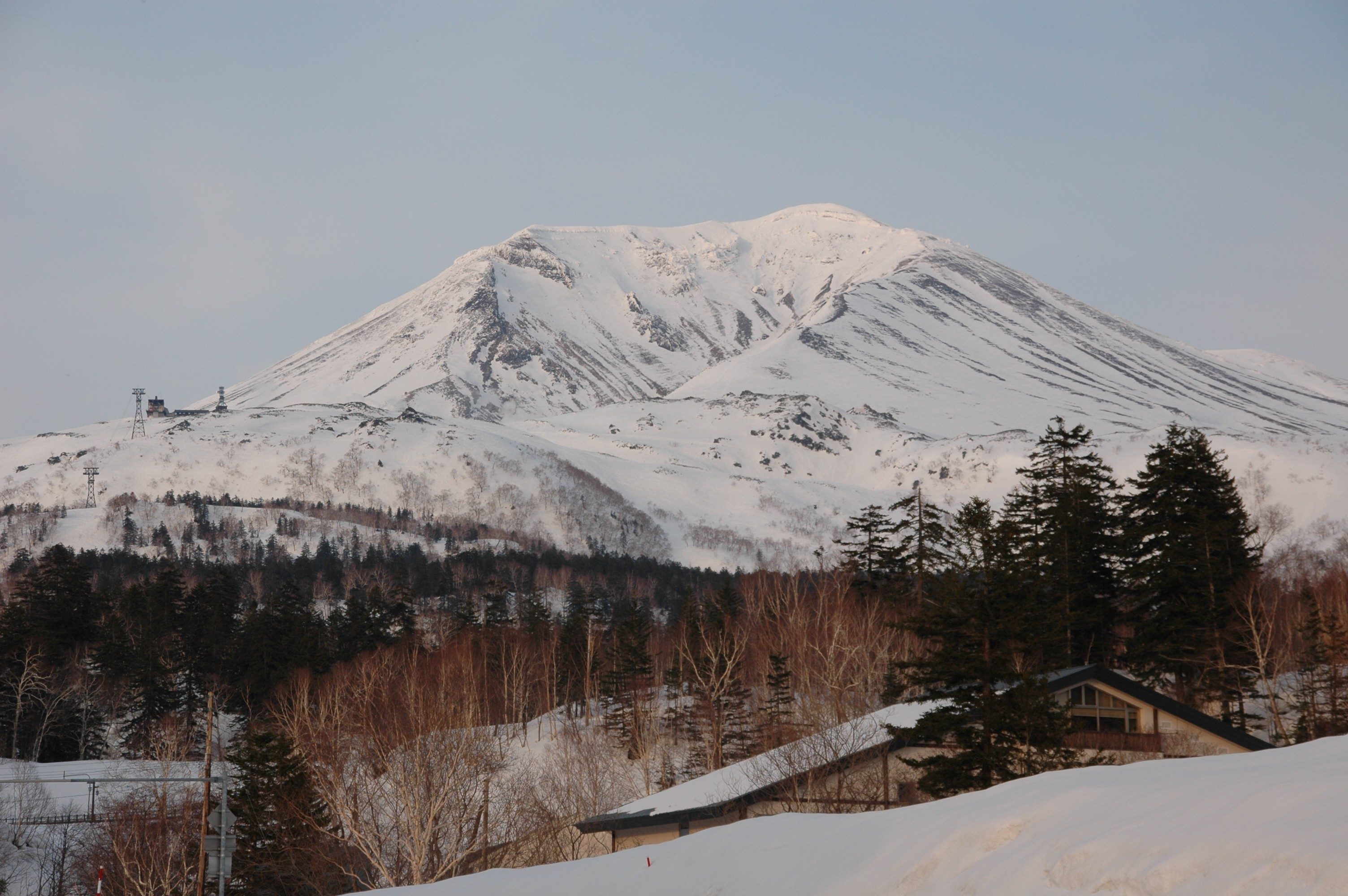 Asahidake spa, Hokkaido, Japan